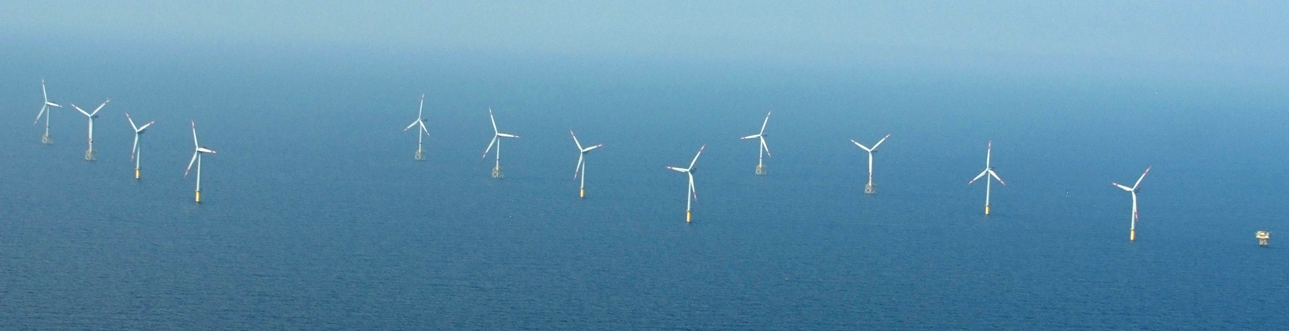 Fotoflug vom Flugplatz Nordholz-Spieka über Bremerhaven, Wilhelmshaven und die Ostfriesischen Inseln bis Borkum